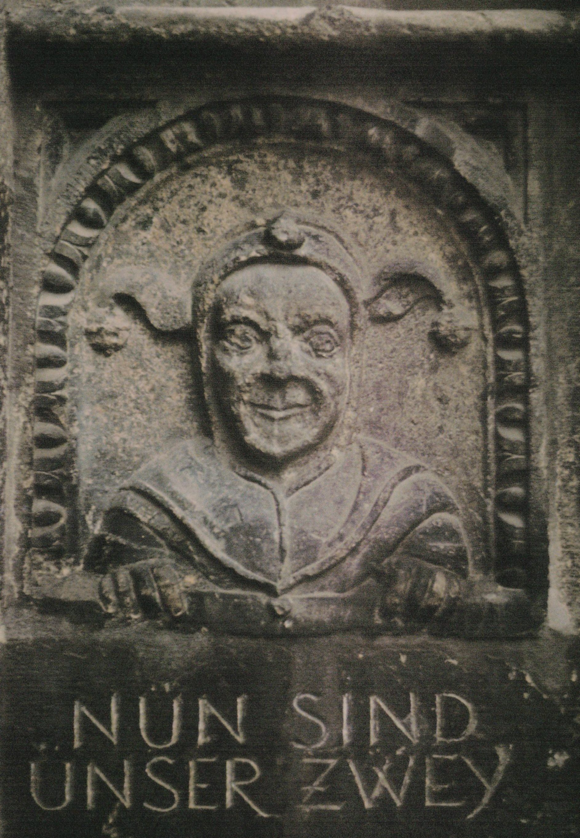 Narrenskulptur am Rathaus in Nördlingen